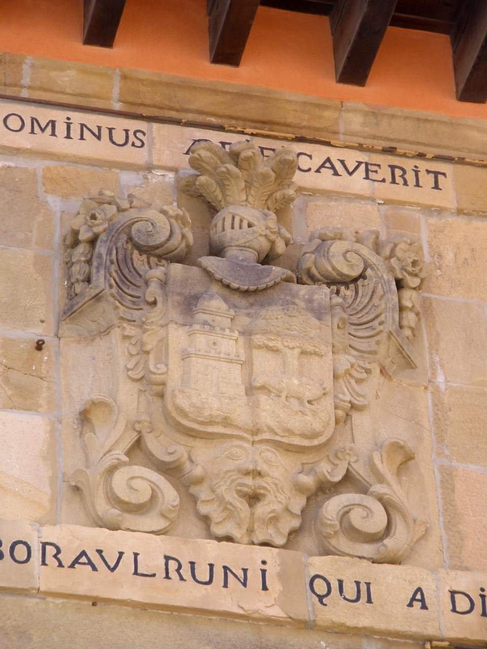 Palacio Indianokua (Getaria)